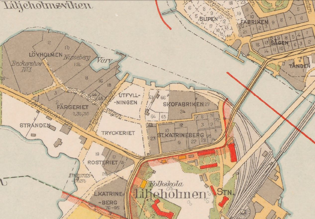 Del av karta över Stockholm visande Liljeholmen